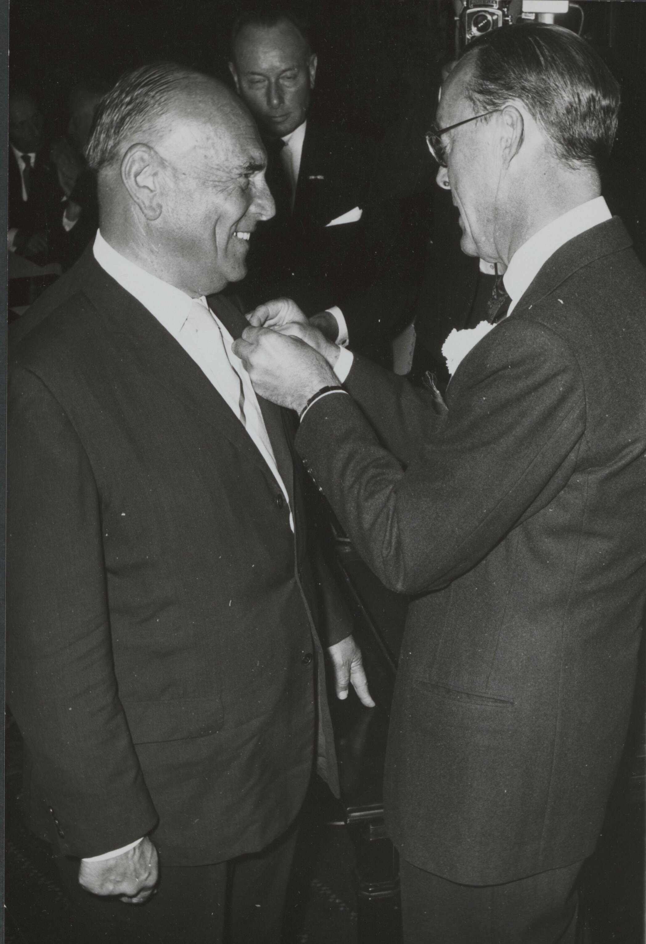 Collectie / Archief : Fotocollectie Elsevier Reportage / Serie : [ onbekend ] Beschrijving : koninklijk huis, prinsen, decoraties, Bernhard, prins, Goes van Naters V.D. Datum : 22 juni 1964 Locatie : Amsterdam, Noord-Holland Trefwoorden : decoraties, koninklijk huis, prinsen Persoonsnaam : Bernhard, prins, Goes van Naters V.D. Instellingsnaam : Zilveren Anjer Fotograaf : Nijs, Jac. de / Anefo Auteursrechthebbende : Nationaal Archief Materiaalsoort : Foto (zwart/wit) Nummer archiefinventaris : bekijk toegang 2.24.05.02 Bestanddeelnummer : 016-0673